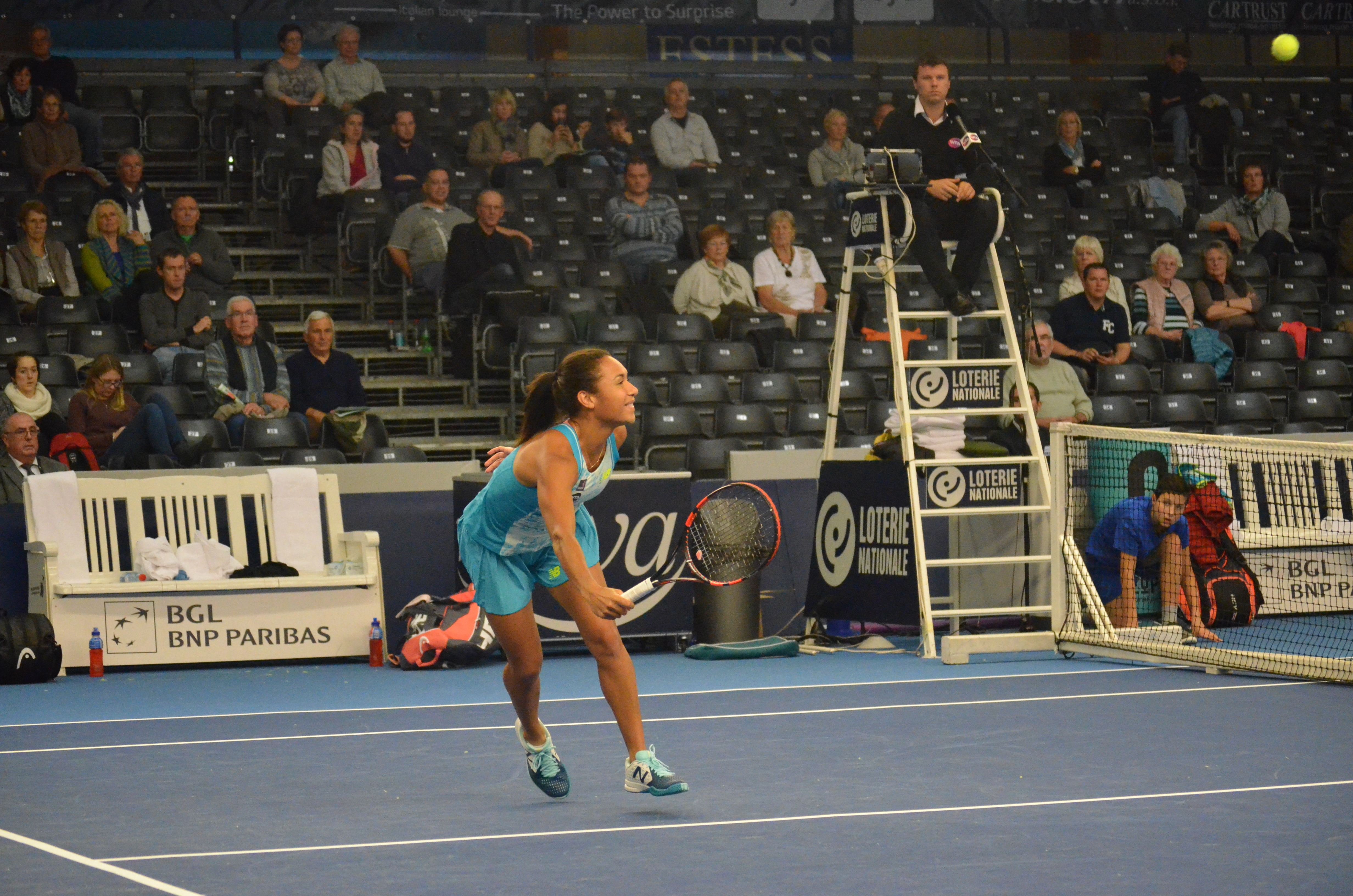 w. Tatjana Maria, d. Carina Witthöft/Sandra Klemenschits 6-2 6-1